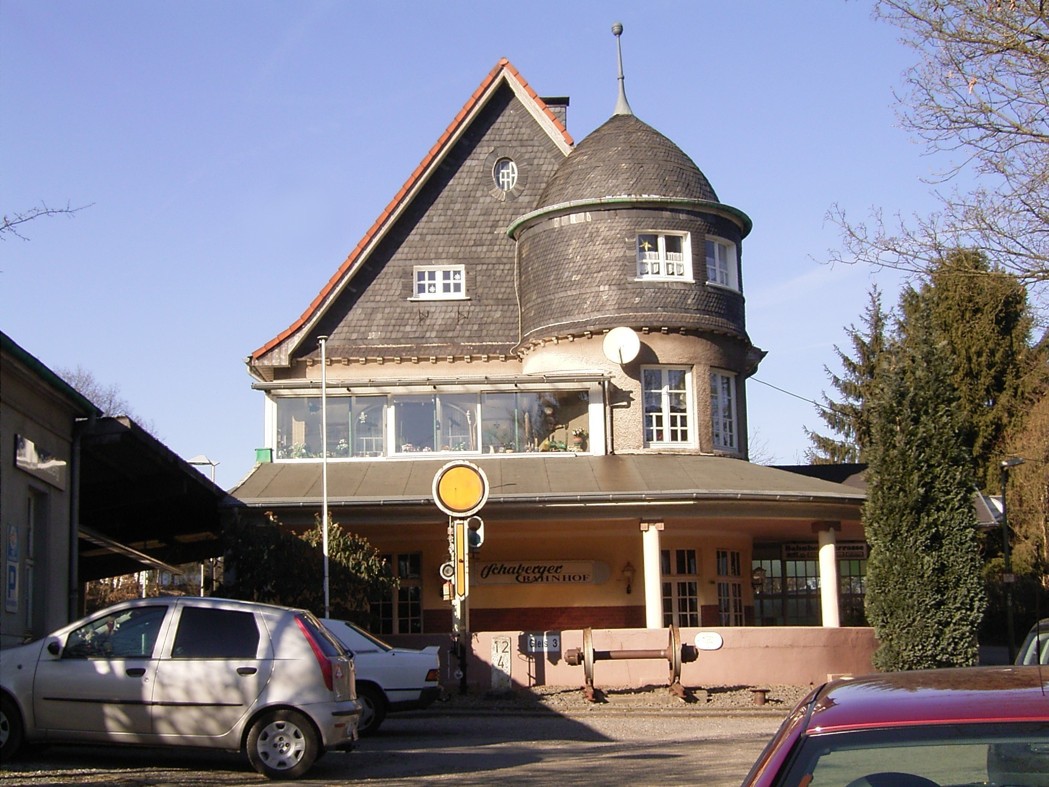 Bahnhof in Solingen-Schaberg